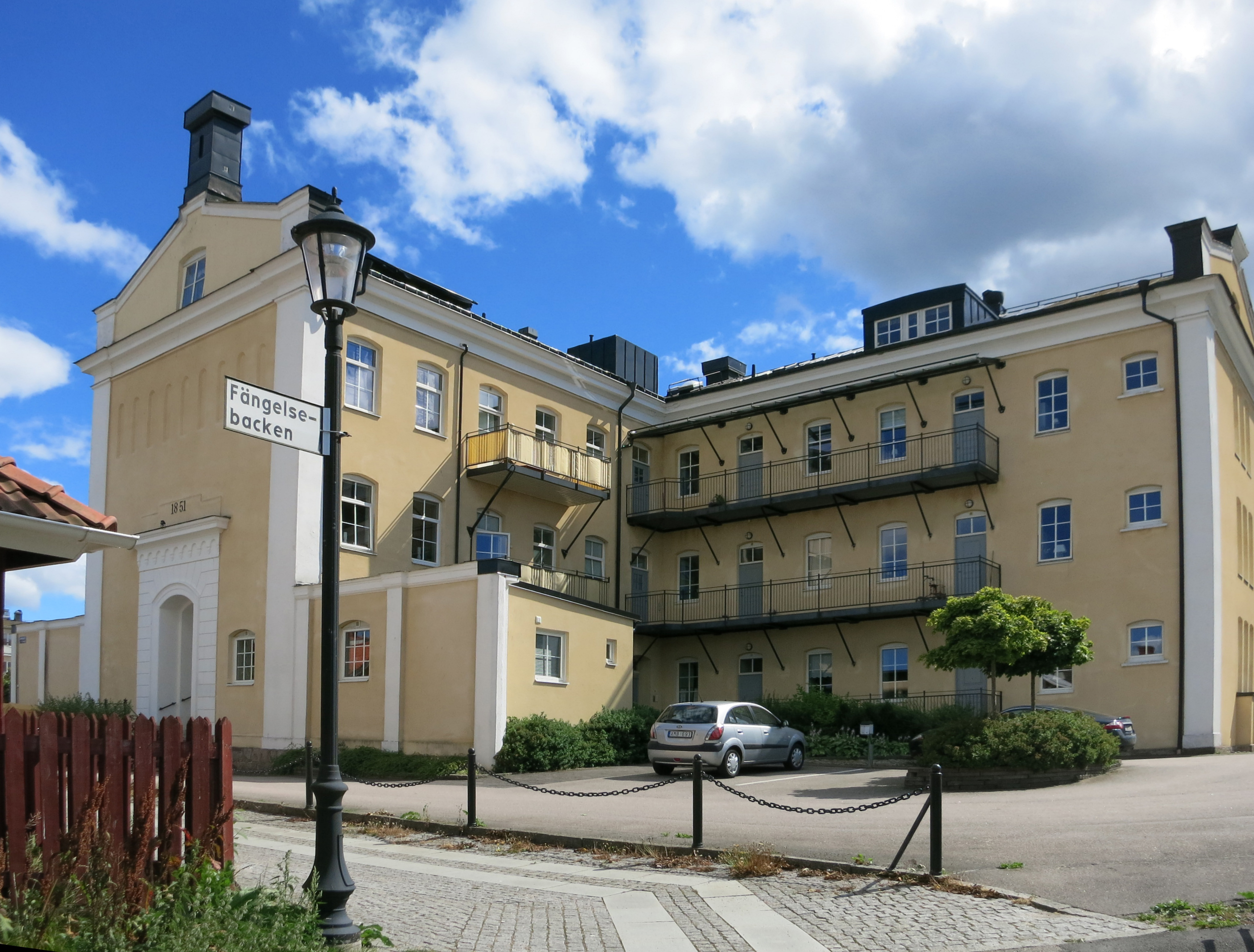 Förutvarande cellfängelset i Vänersborg. Nu Bostadsrättsföreningen Borgen i Vänersborg